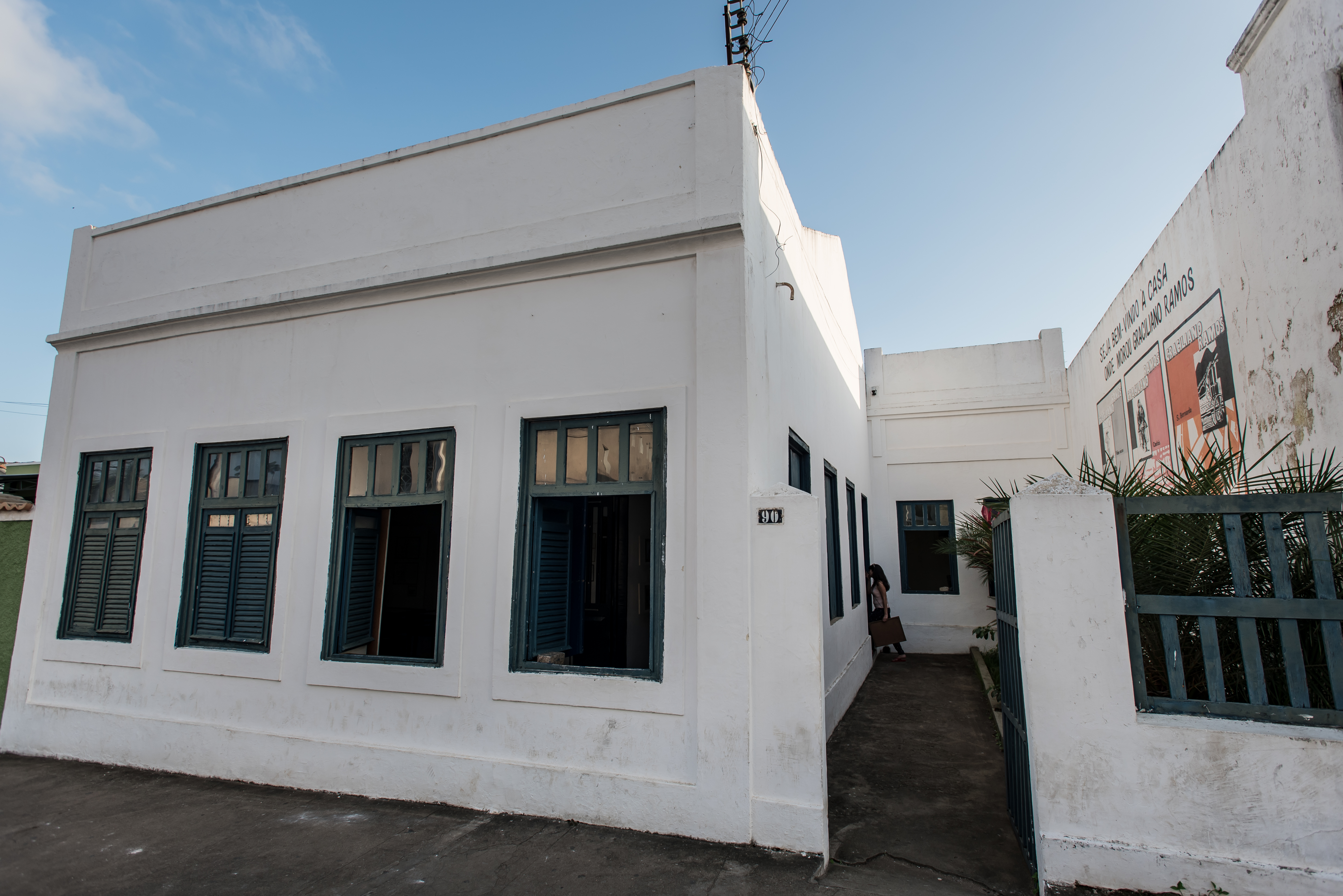 Casa à avenida General Gabino Bezouro, nº 12, "Casa de Graciliano Ramos"